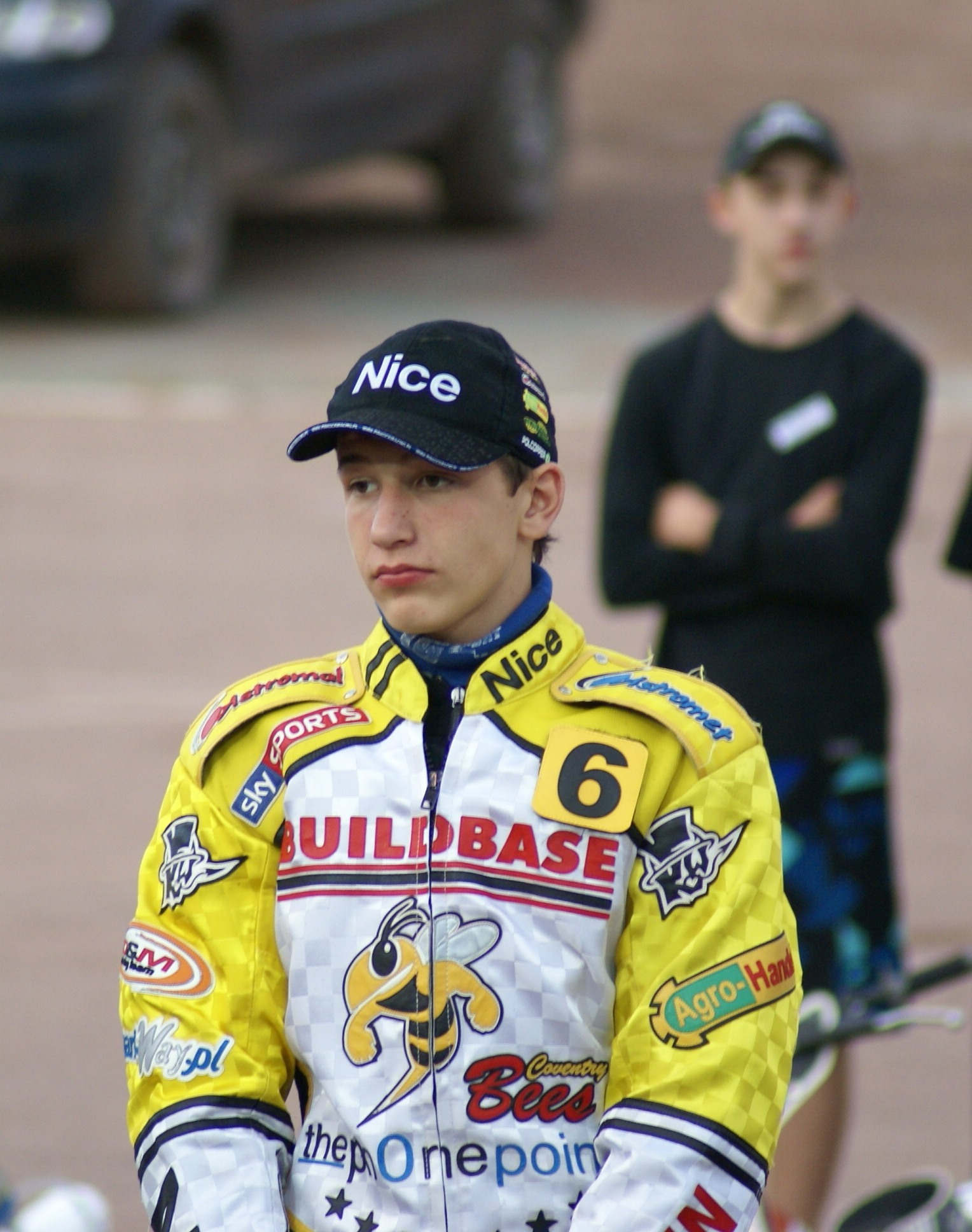 Piotr Pawlicki